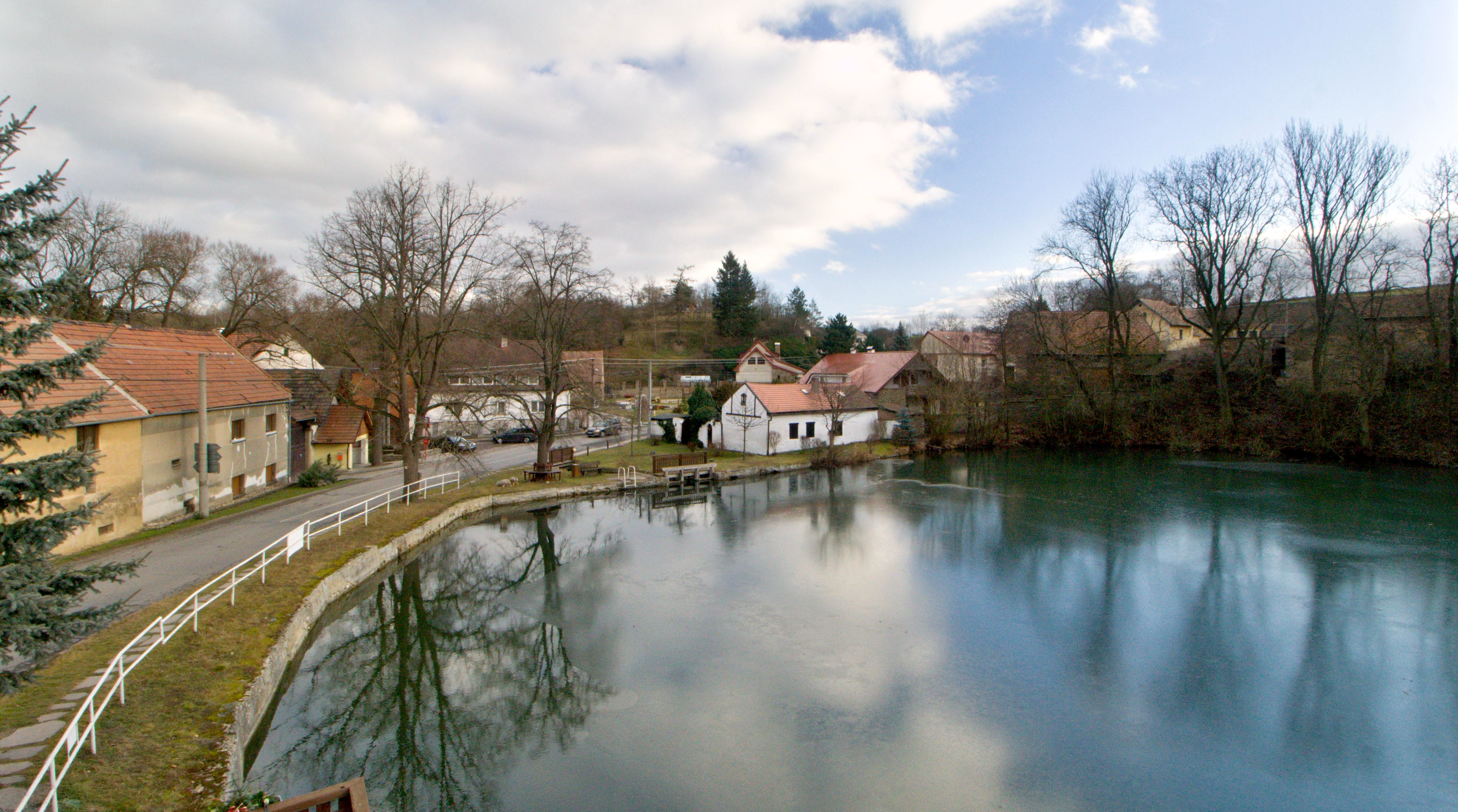 Libochovičky, okres Kladno